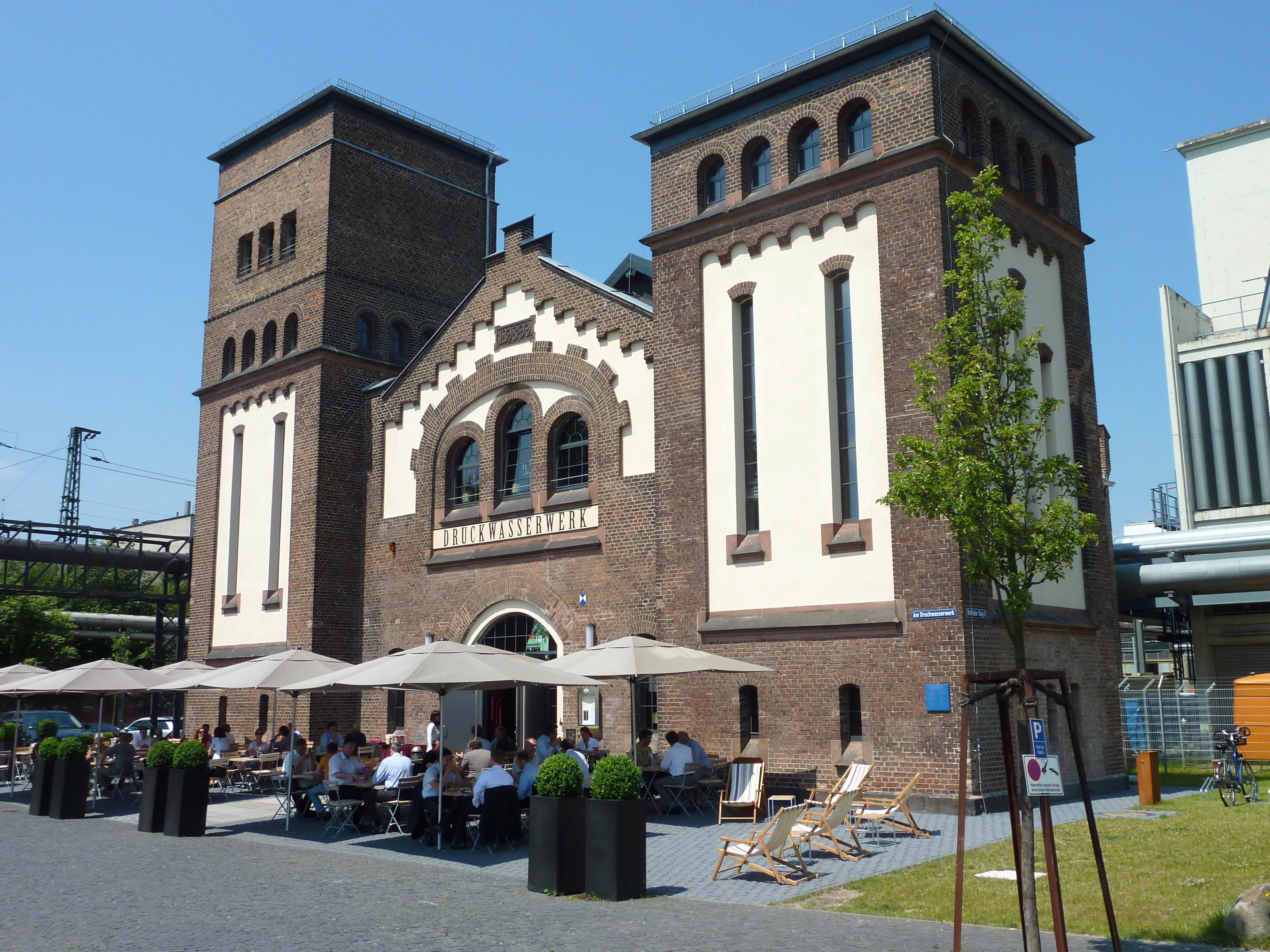 Frankfurt am Main: Das Druckwasserwerk am Frankfurter Westhafen – ehemaliges Maschinenhaus des Hafens, erbaut 1886–1888. Nach Umbau und Renovierung seit 2009 Gastronomiebetrieb. Ansicht von Südosten.